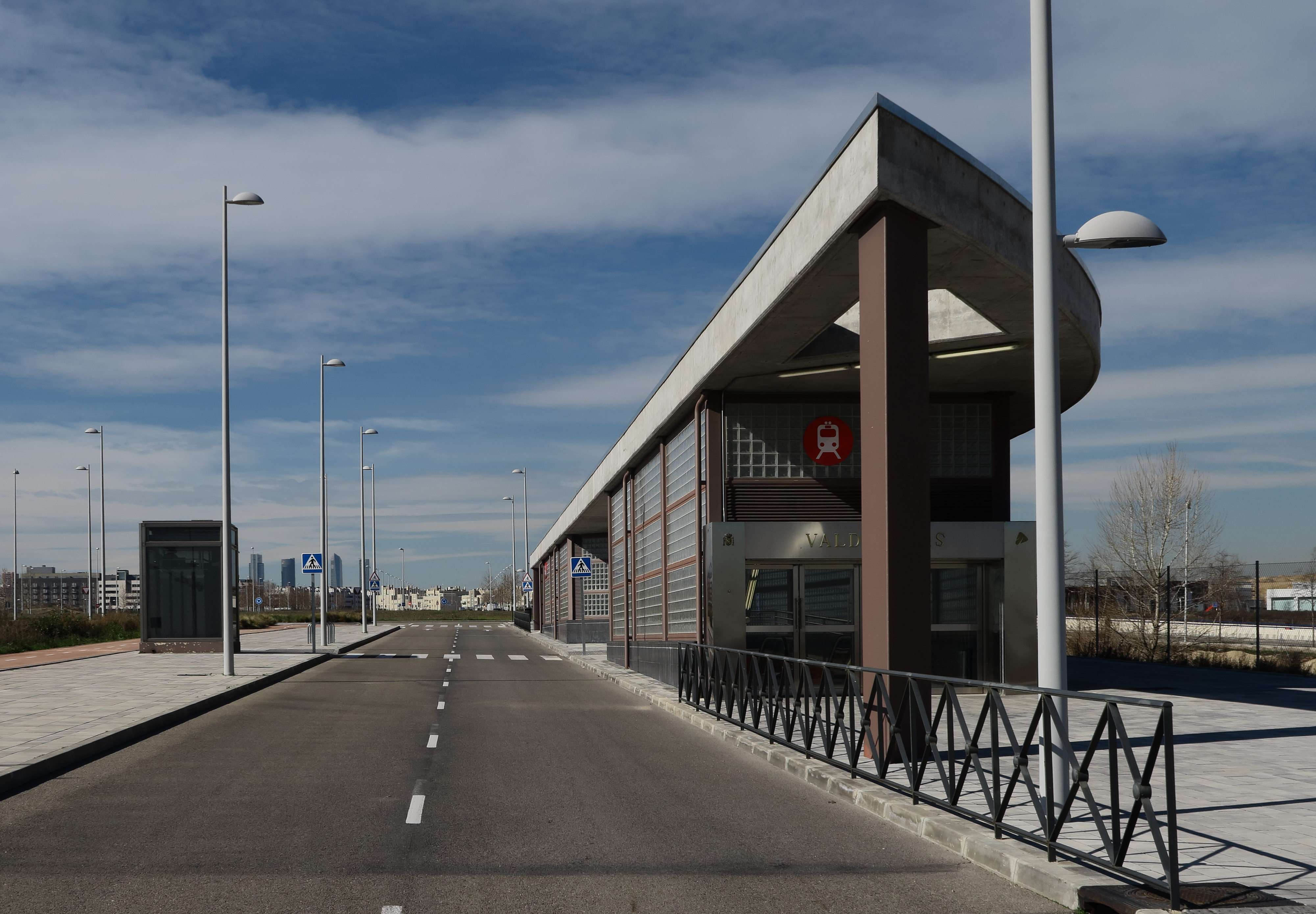 Estación de Valdebebas